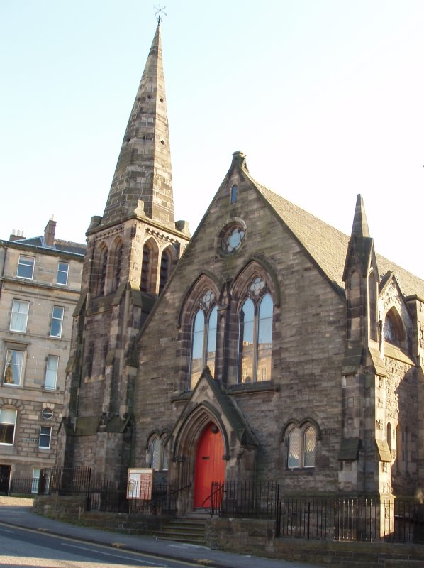 An independent evangelical church. See [1]Bellevue Chapel, Rodney St